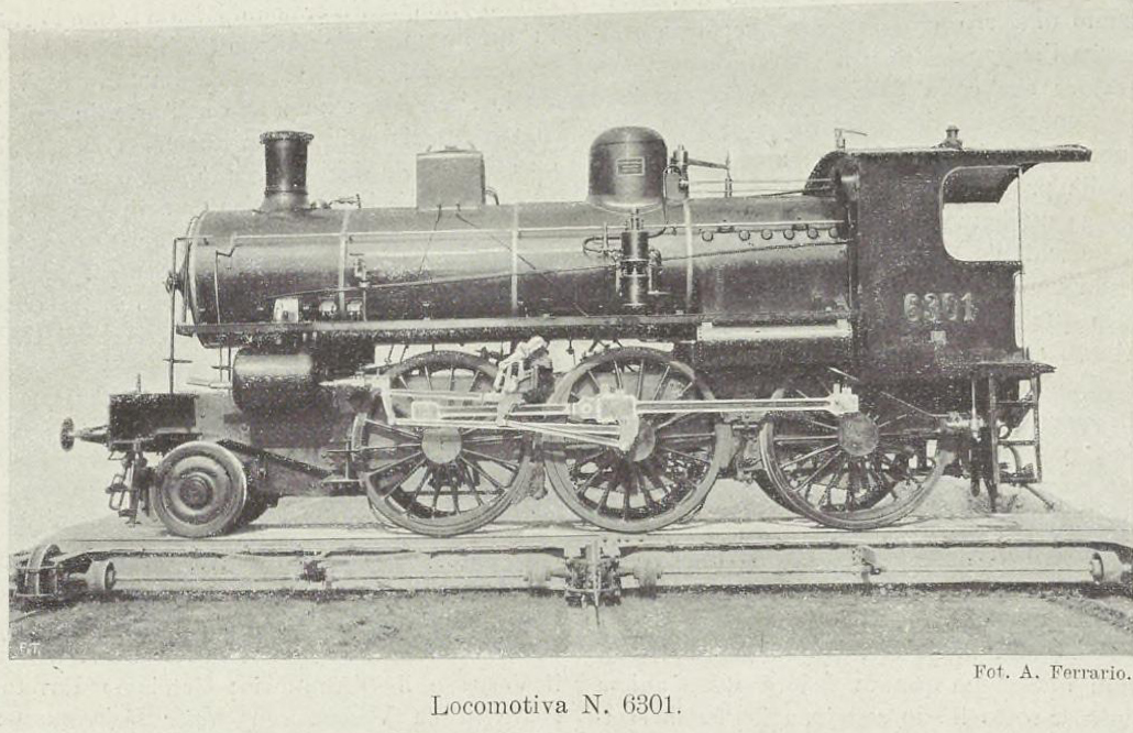 Locomotiva N. 6301